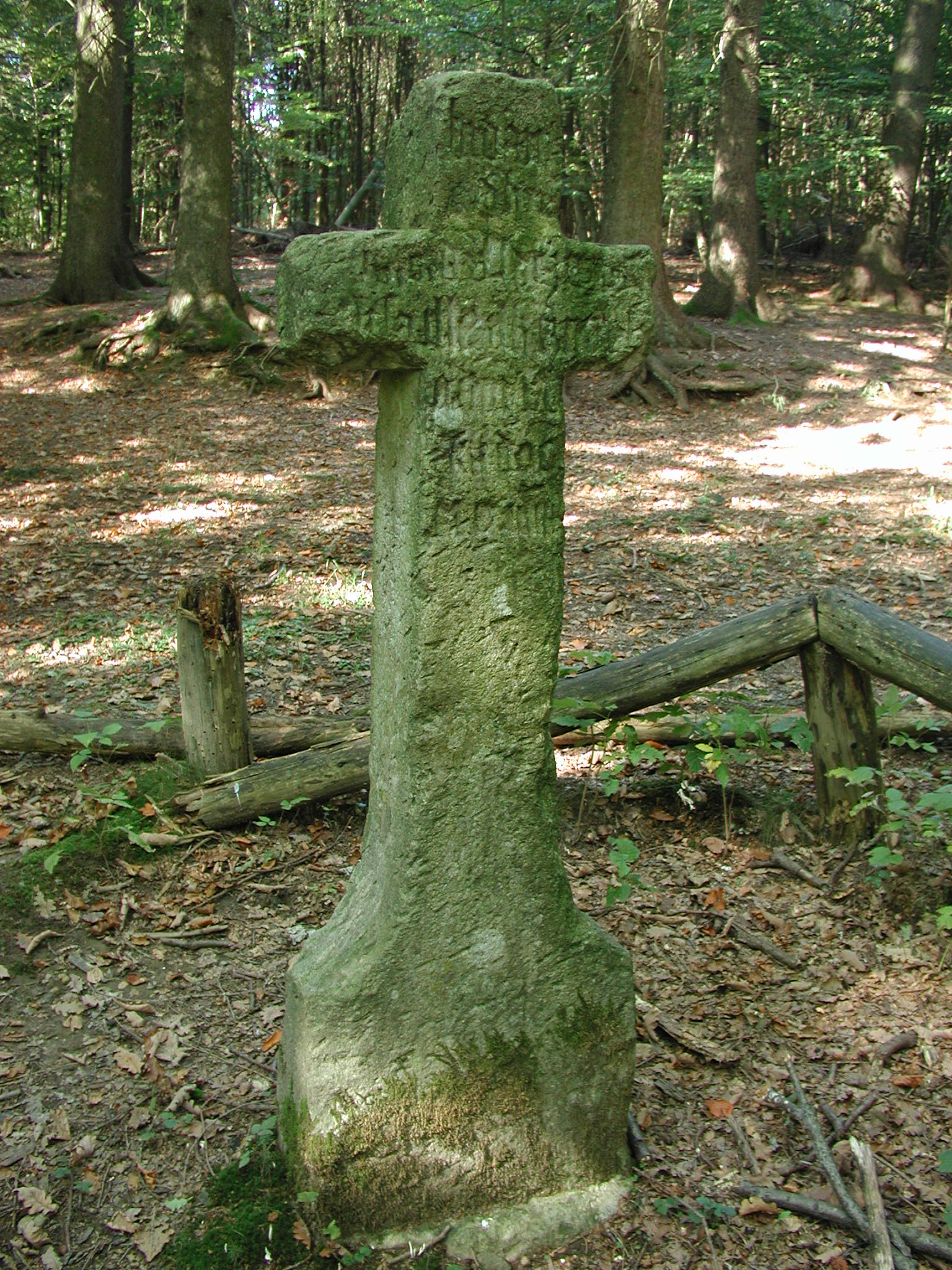 Bild: Steinernes_KreuzRS.JPG